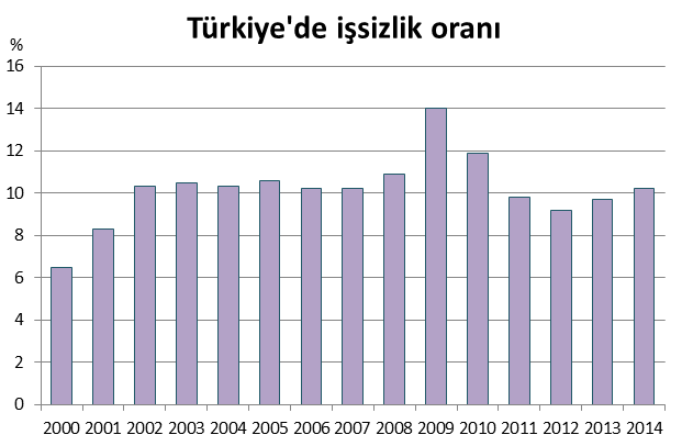 Türkiye - İşsizlik Oranı. IMF Data and Statistics